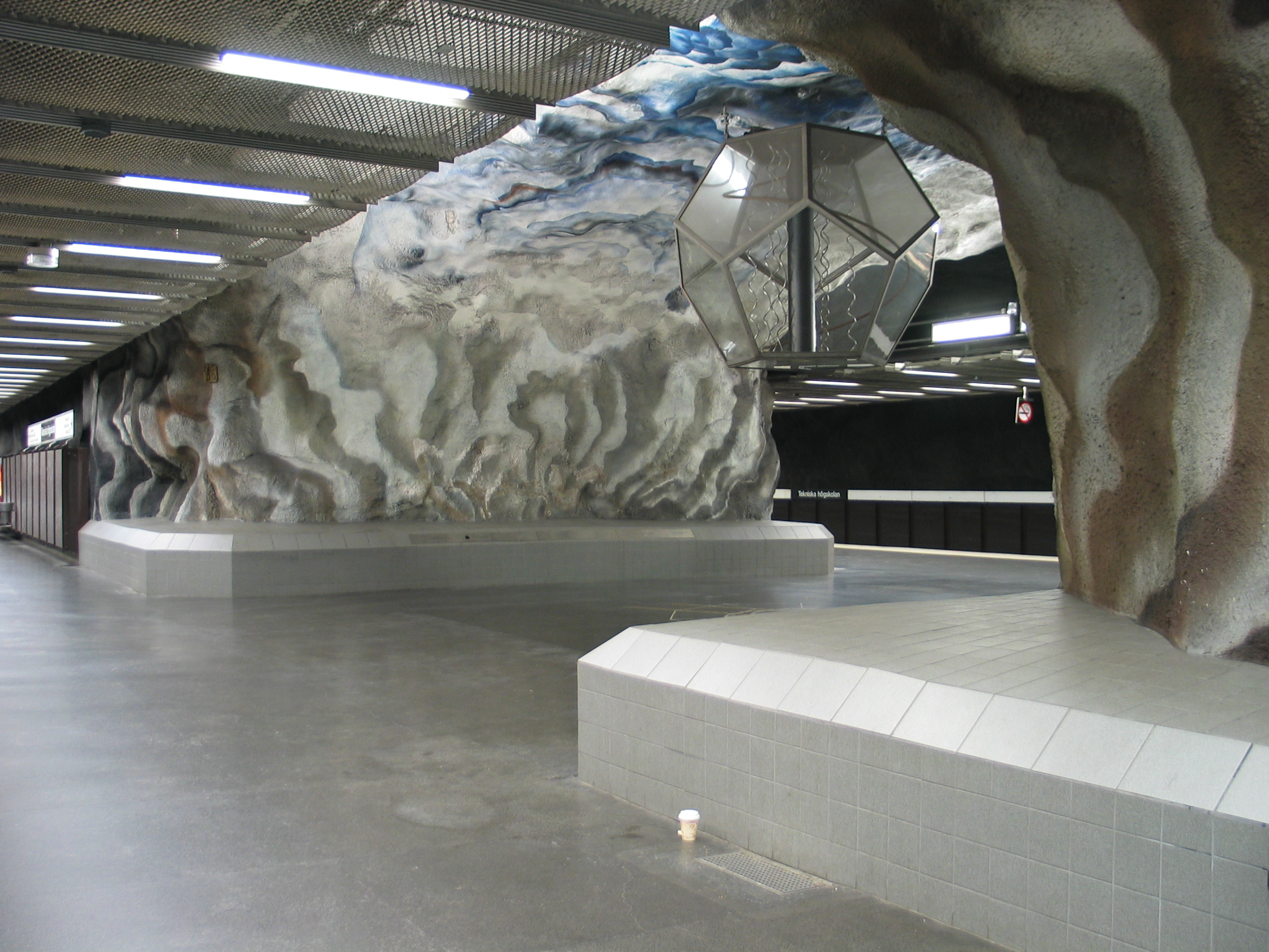 Tekniska högskolan, a metro station in Stockholm, Sweden.